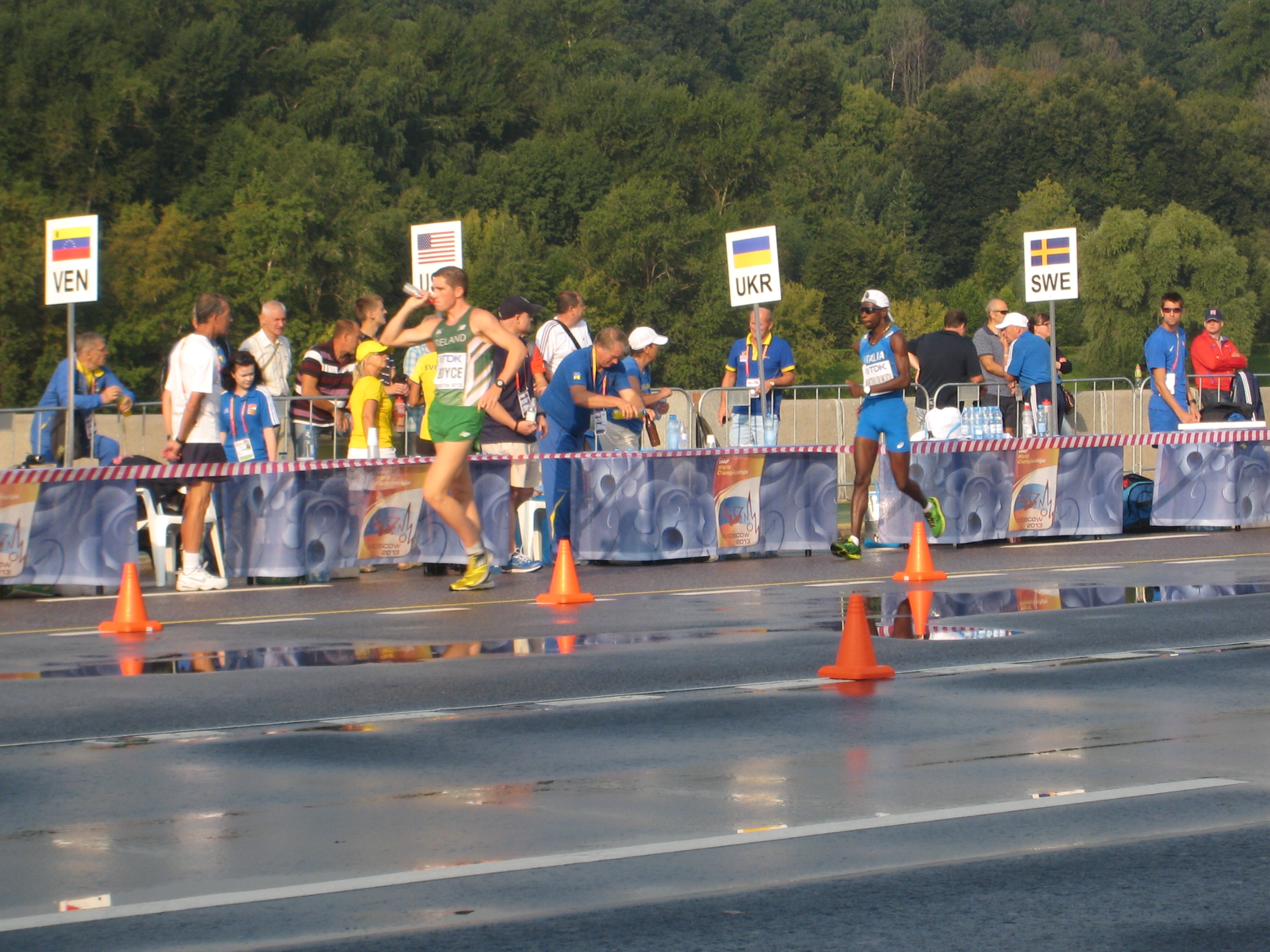 Чемпионат мира по лёгкой атлетике 2013. Ходьба 50 км, мужчины. Ирландец Брендан Бойз и итальянец Жан-Жак Нкоулукиди